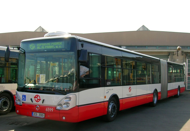 Pražský Citelis 18M Euro 4 ev.č. 6599